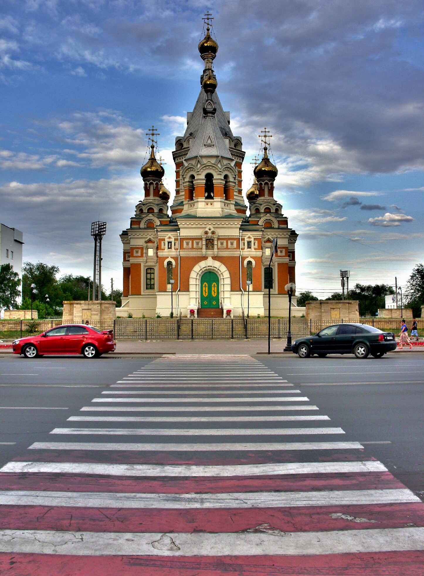 Православный храм в Уральске, построенный в 1891-1907 годах в память 300-летия служения Уральского казачьего войска России